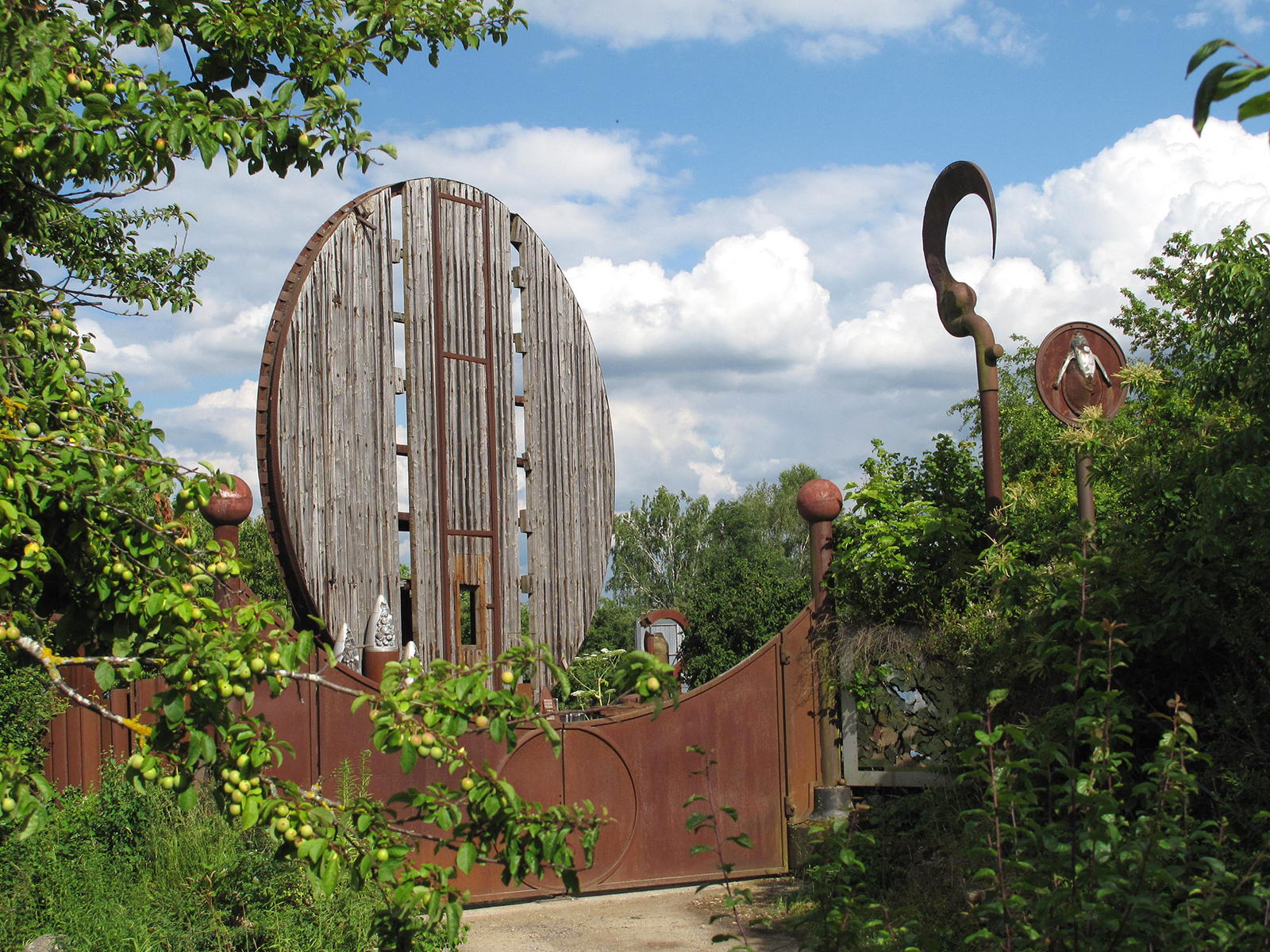 Lutz Ackermann, Eingang zum „Kunst-Kraft-Werk“ Skulpturenpark, um 1983 – Deutschland, Baden-Württemberg, Gäufelden-Nebringen